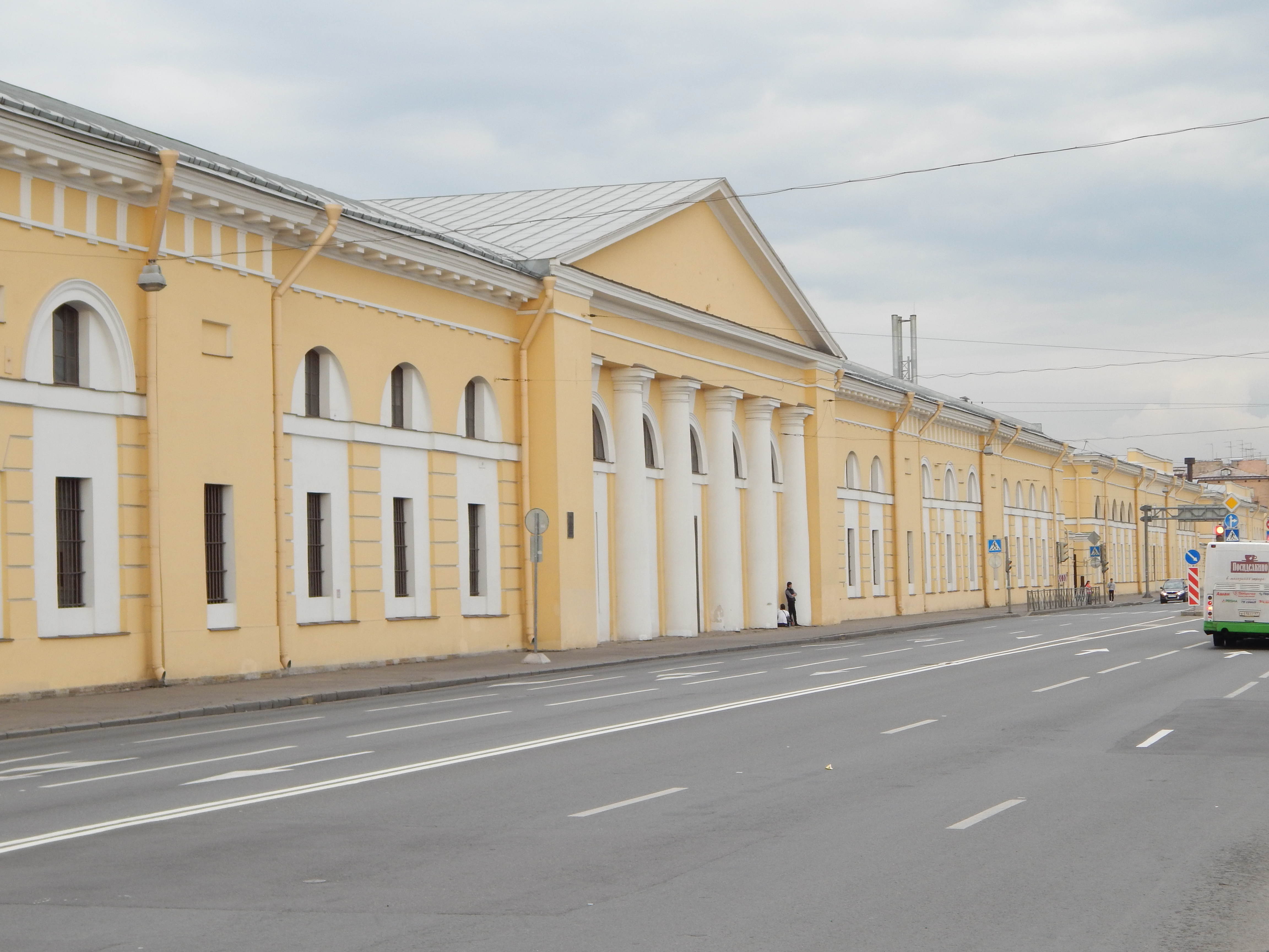 Корпус западный (манеж Николаевского кавалерийского училища) (Санкт-Петербург, Обводного канала наб., 173)